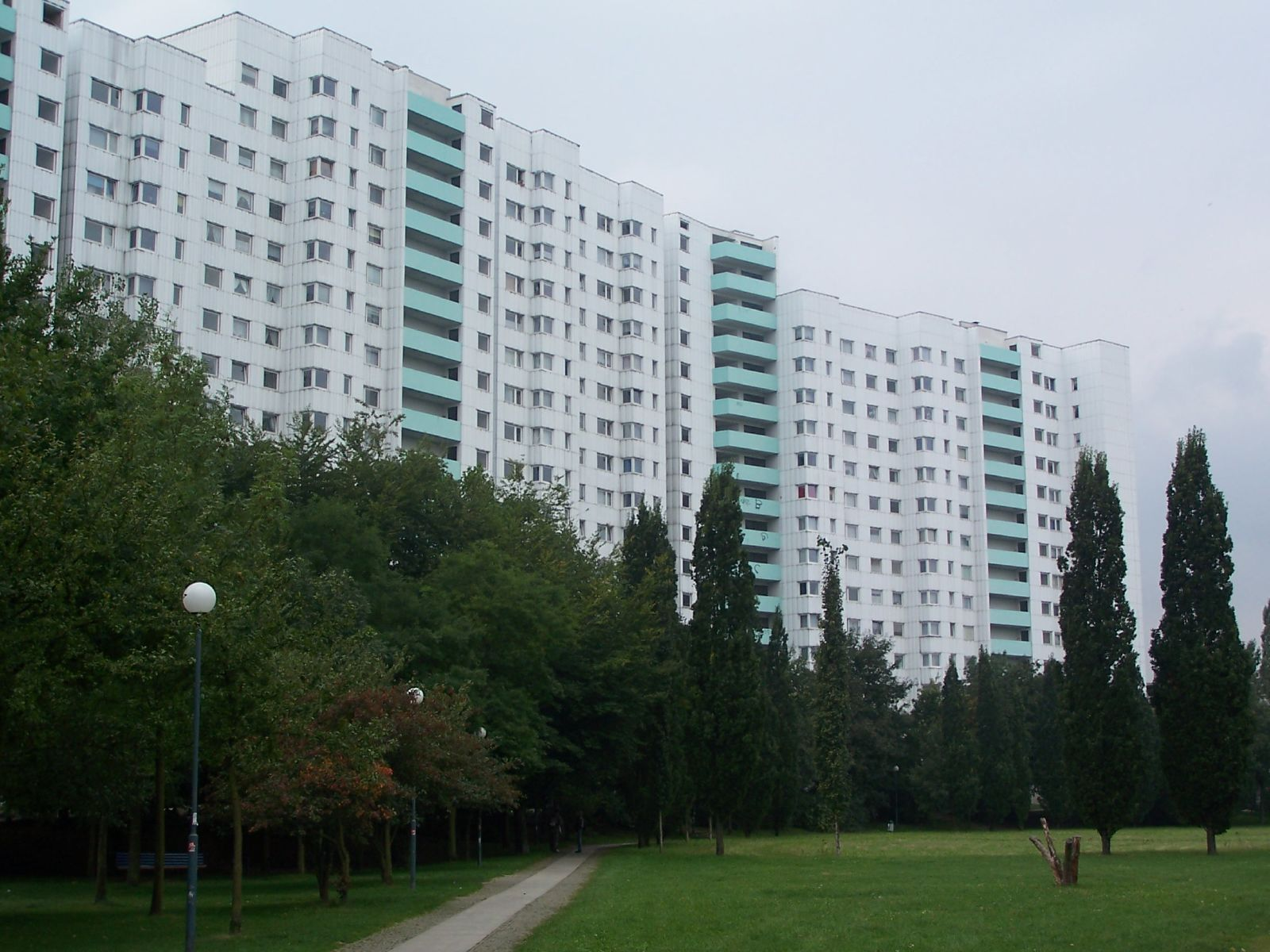 Apartment houses in Gropiusstadt, Berlin